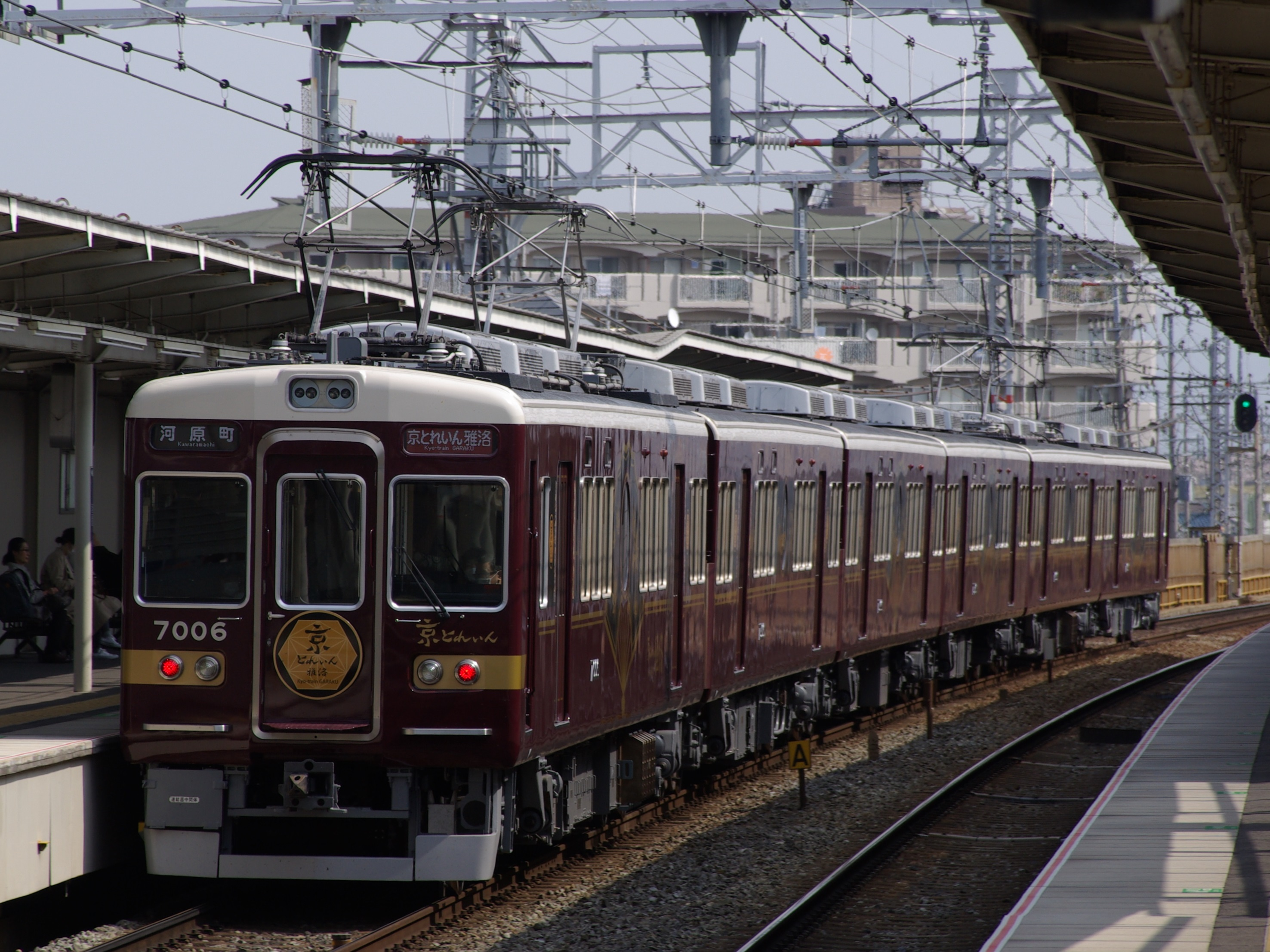 水無瀬を通過し河原町に向かう京とれいん雅洛